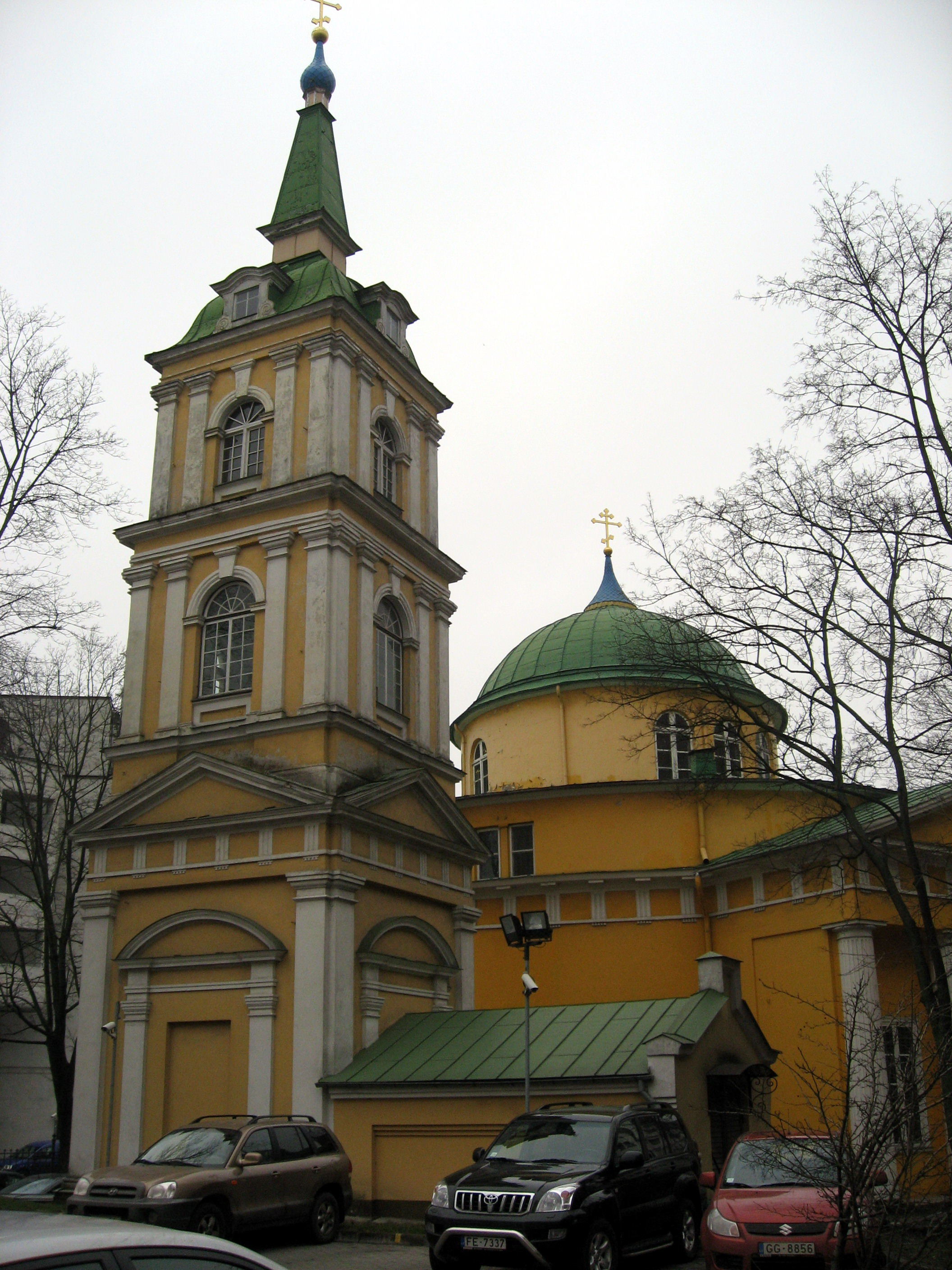 Kostel u Brīvības iela